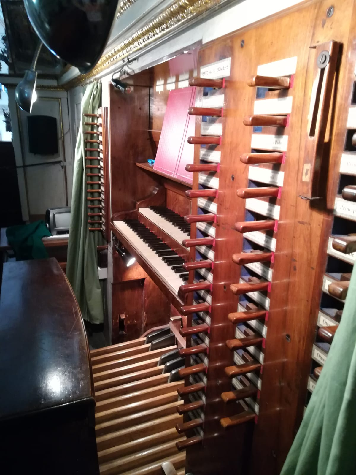 Consolle di un organo meccanico Bossi-Urbani del 1861